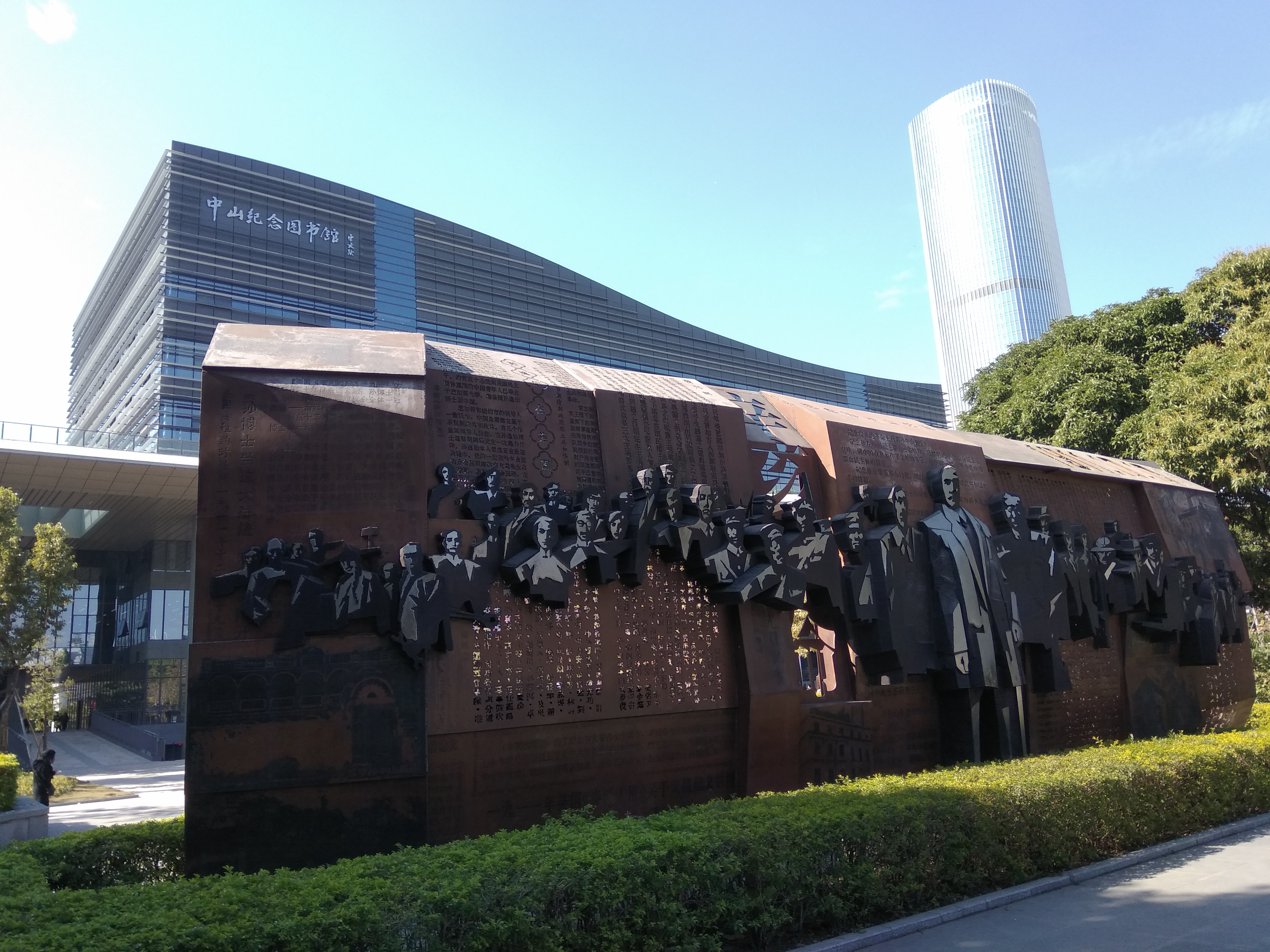 中文（中国大陆）: 中山纪念图书馆